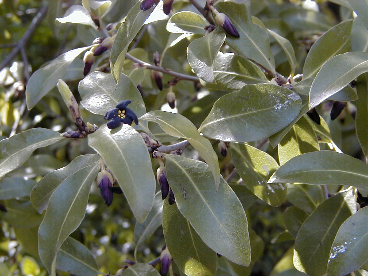 Pittosporum eugenioides. Real Jardín Botánico, Madrid.